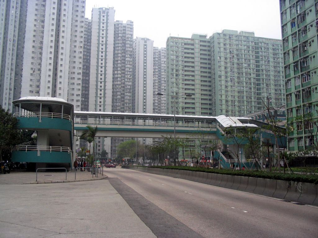 小西灣道及小西灣邨(右) Siu Sai Wan Road & Siu Sai Wan Estate (right)